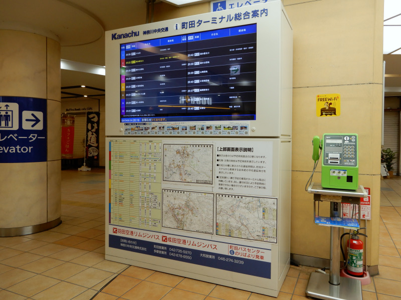 町田ターミナル バス運行情報案内表示機（東京都町田市原町田3-1-4）